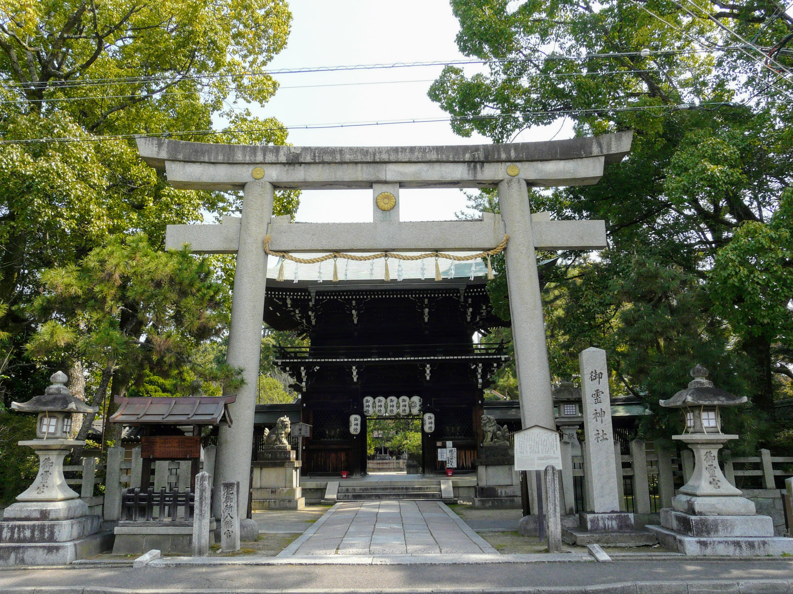 京都市上京区にある上御霊神社の鳥居と楼門（西門） Panasonic Lumix DMC-FZ18